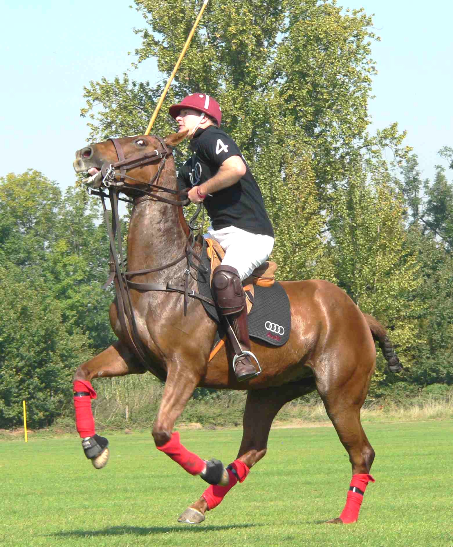 Polo